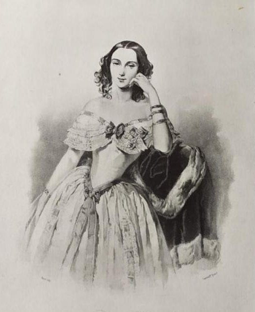 Анна Алексеевна Струкова, урожденная Арбузова (1820-1882)